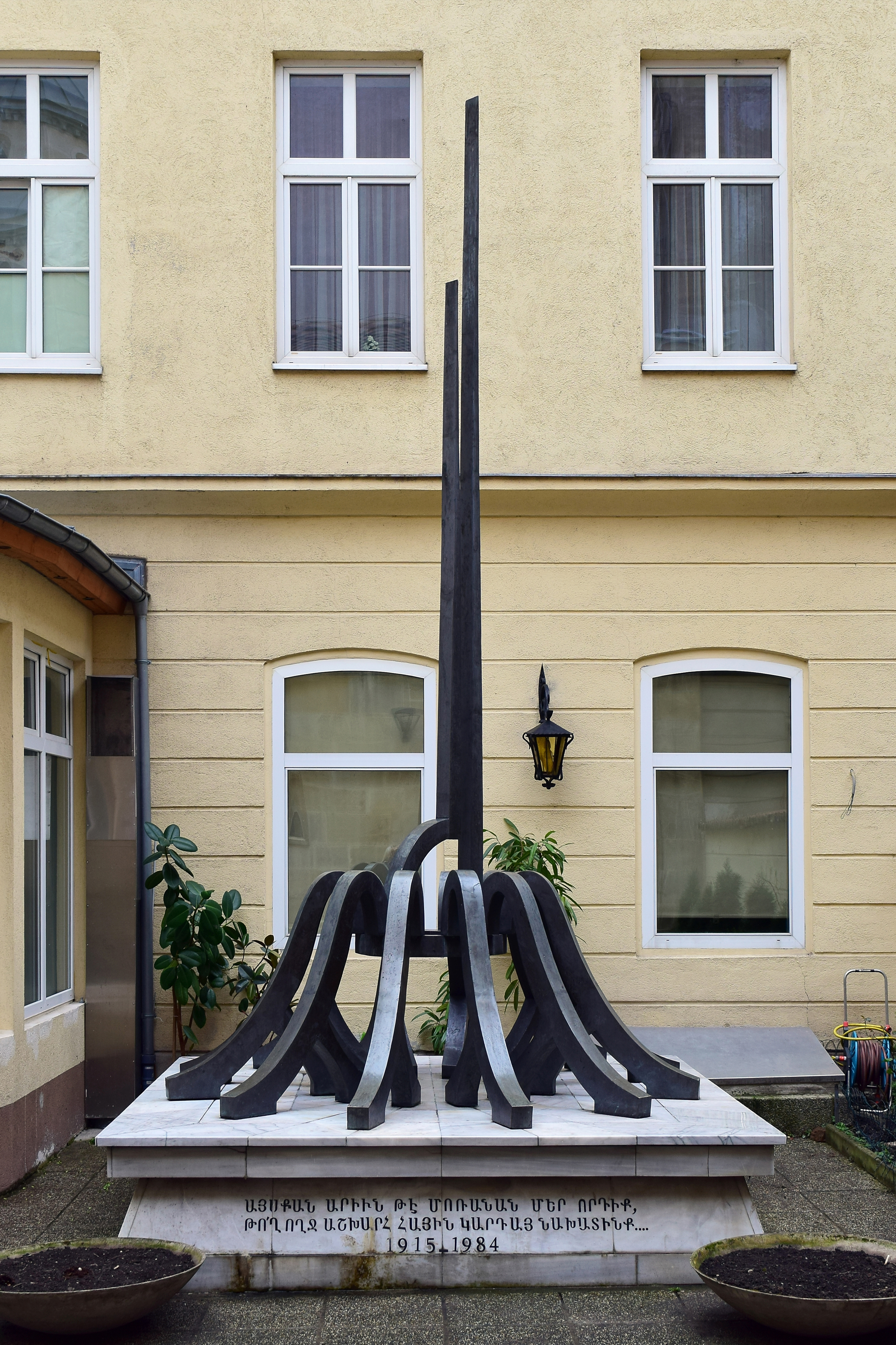 Denkmal für die Opfer des Völkermordes an Armeniern 1915